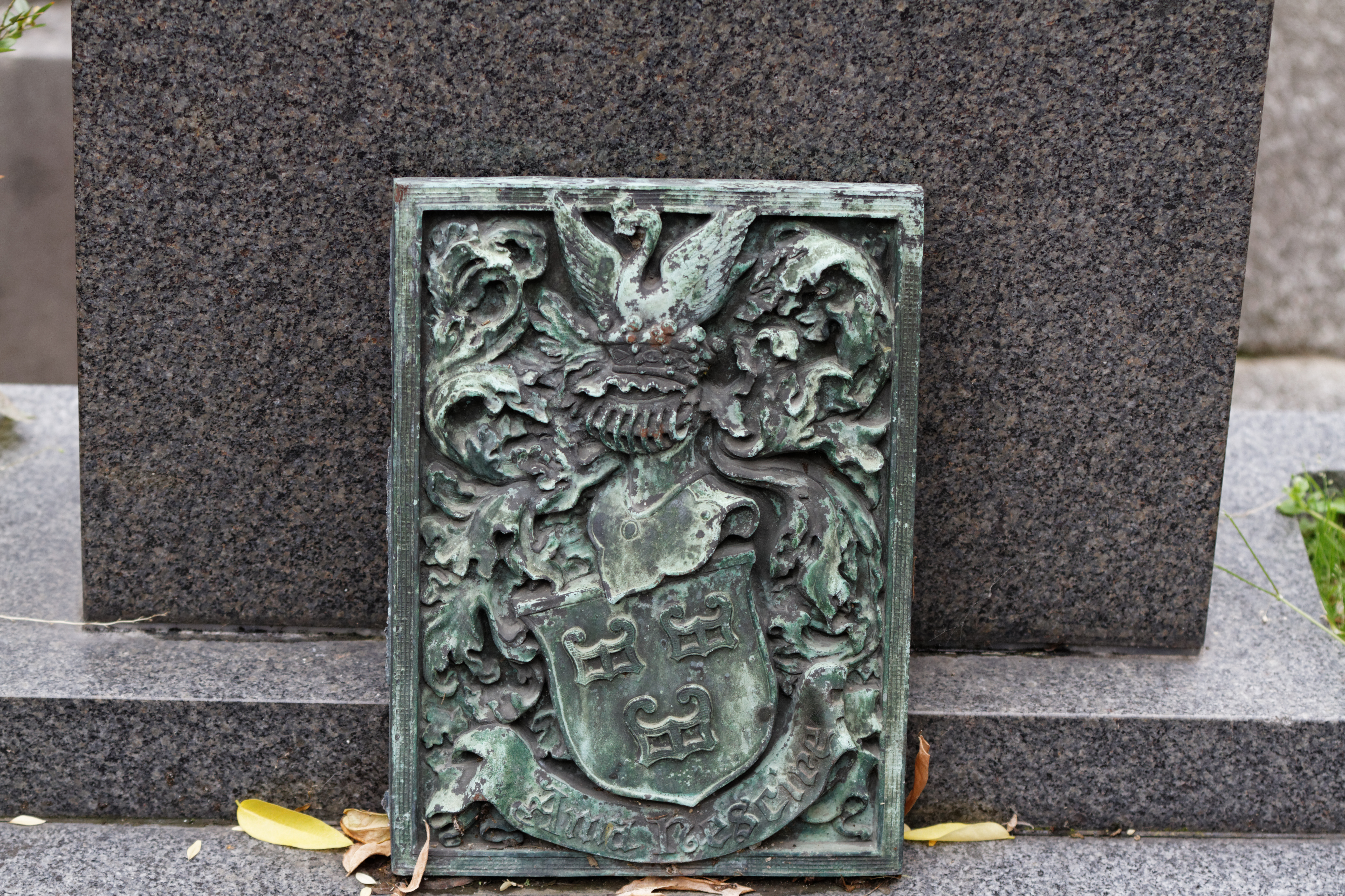 Sépulture du baron Gaston Stalins (1879-1952) et de son épouse. Stalins présida l'Académie internationale d'héraldique de la création de l'associaton en 1949 à sa mort en 1952.